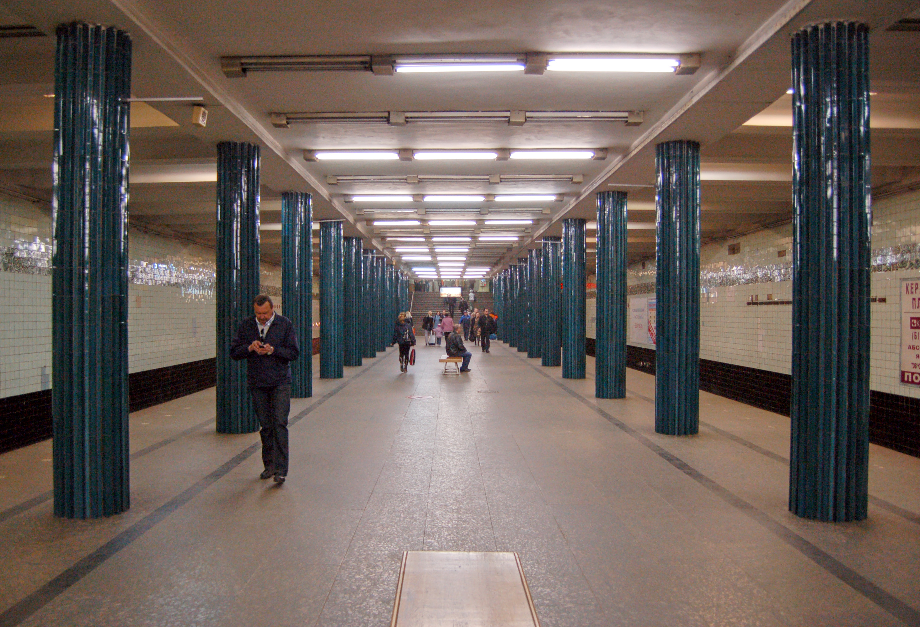 Станция метро «Нивки»